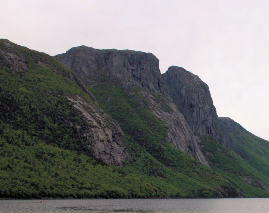 Reinarknuten, Strand, Rogaland